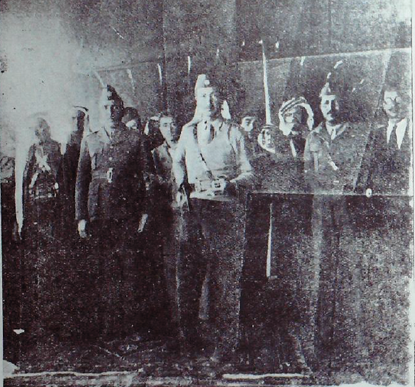 الشريف حسين الشقراني عبد الجبار الراوي عبد الإله بن علي الهاشمي العقيد عبيد الضايفي